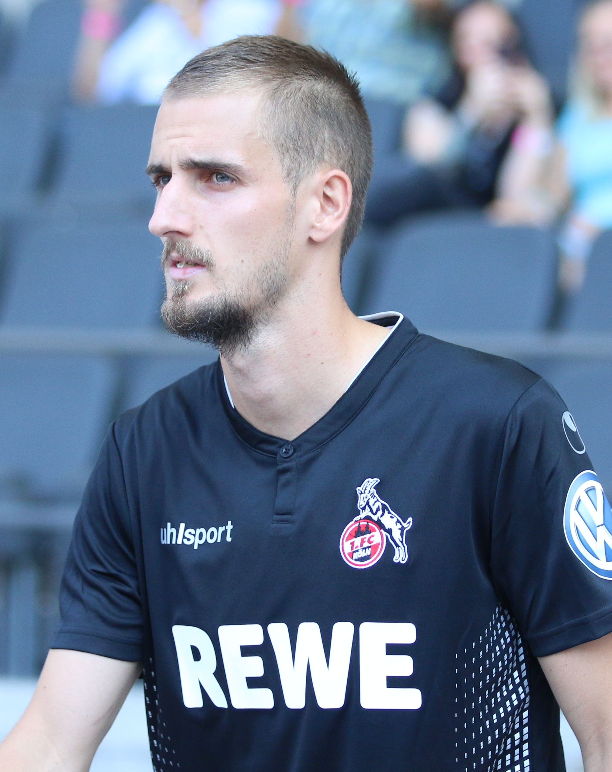 DFB-Pokal 2018/19, 1. Hauptrunde: BFC Dynamo gegen 1. FC Köln 1:9 (1:4)